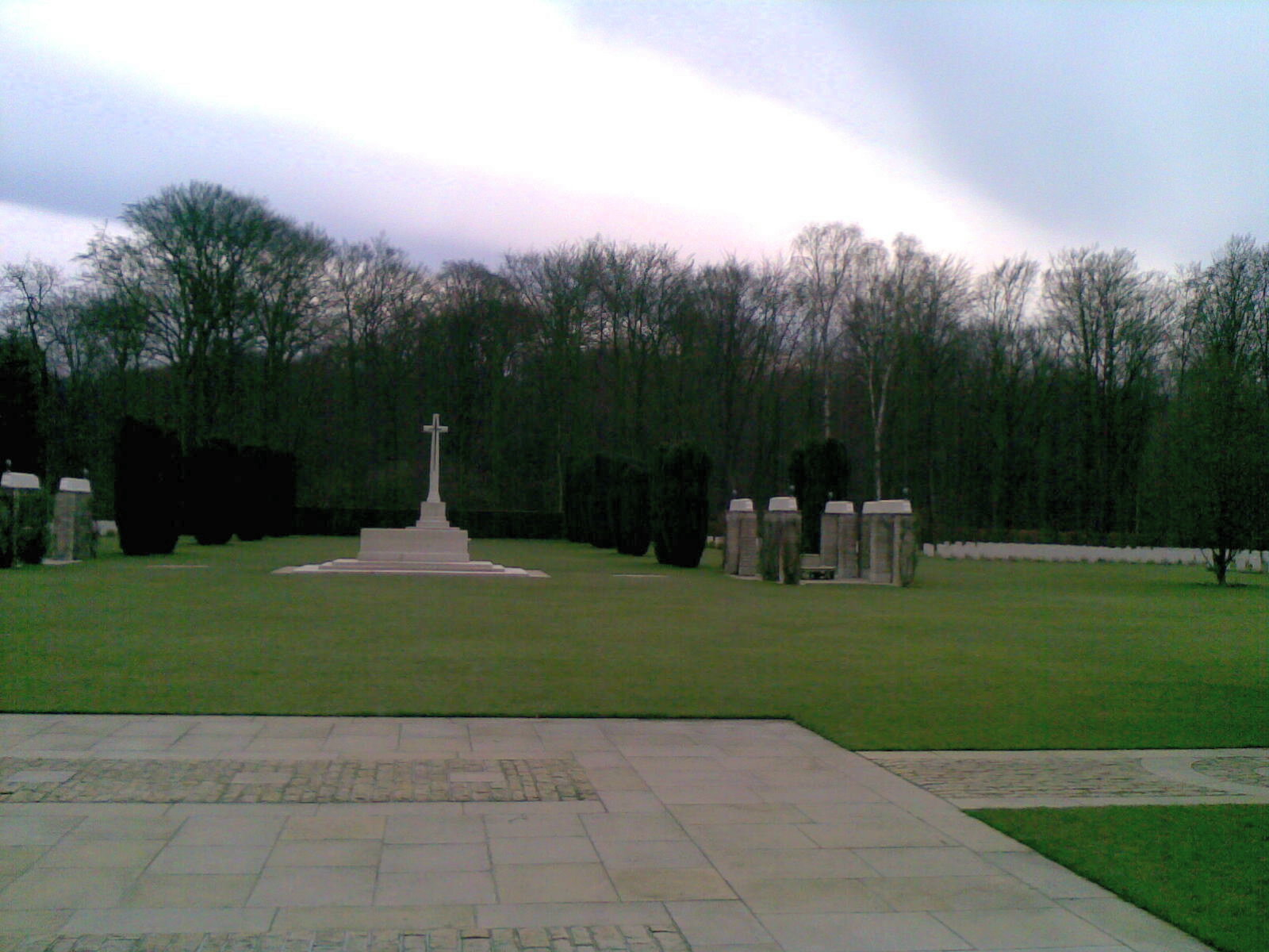 Britischer Ehrenfriedhof Reichswald Opferkreuz und Altarstein